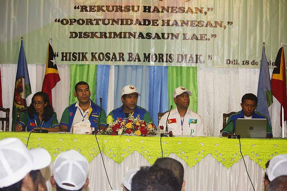 Von links: Meta Mendonca, Ato Fernandes, Deometrio Amaral de Carvalho, Longuinhos dos Santos und Antonio Freitas auf dem ersten Nationalkongress der PLP